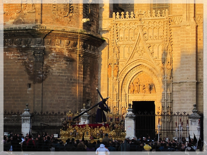 Nuestro padre Jesús de la Salud a la salida de la catedral. Semana Santa de Sevilla